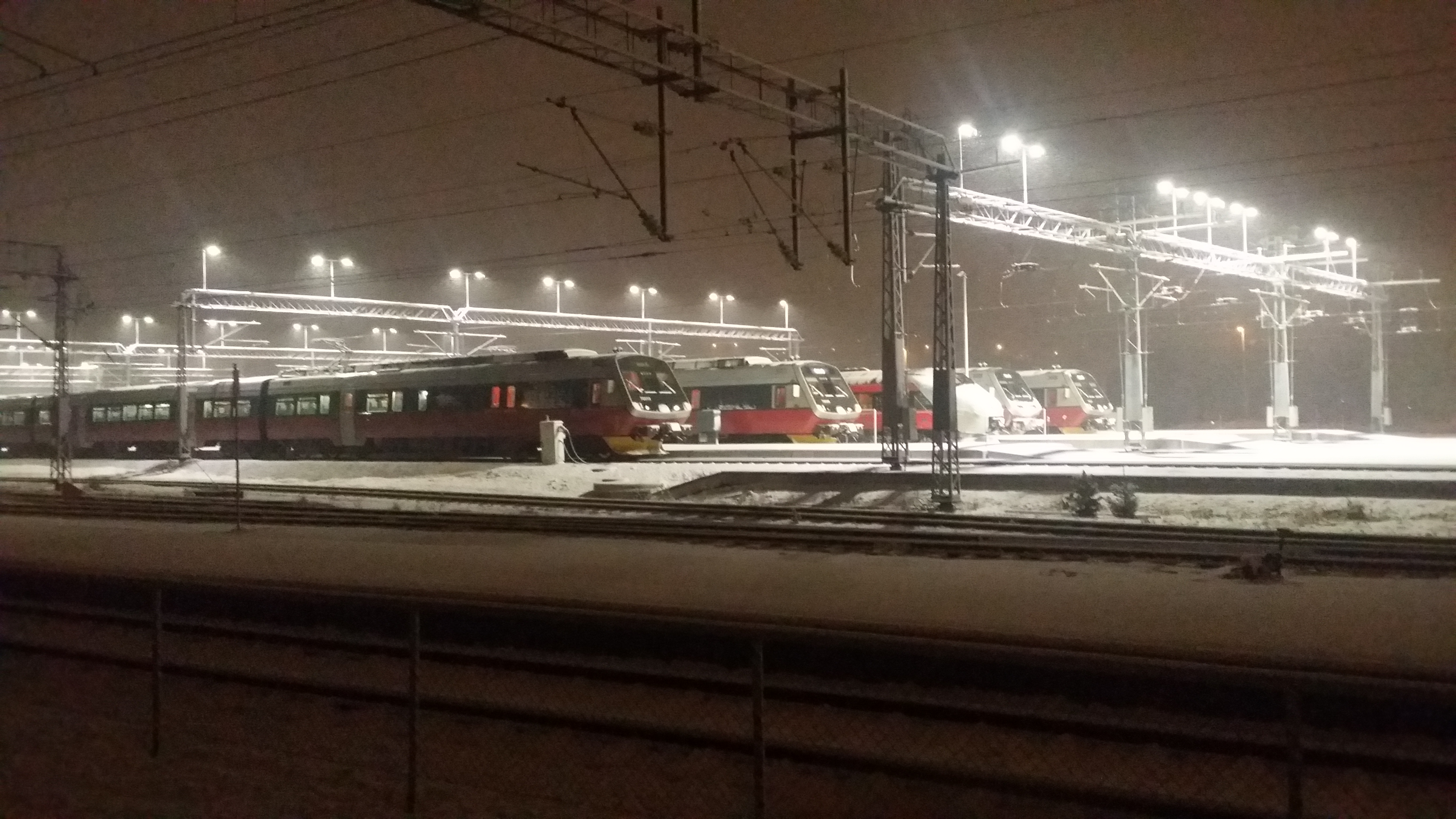 Driftsbanegården ved Halden stasjon.